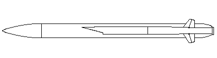 Profil du missile nucléaire ASMPProfile of nuclear missile ASMP